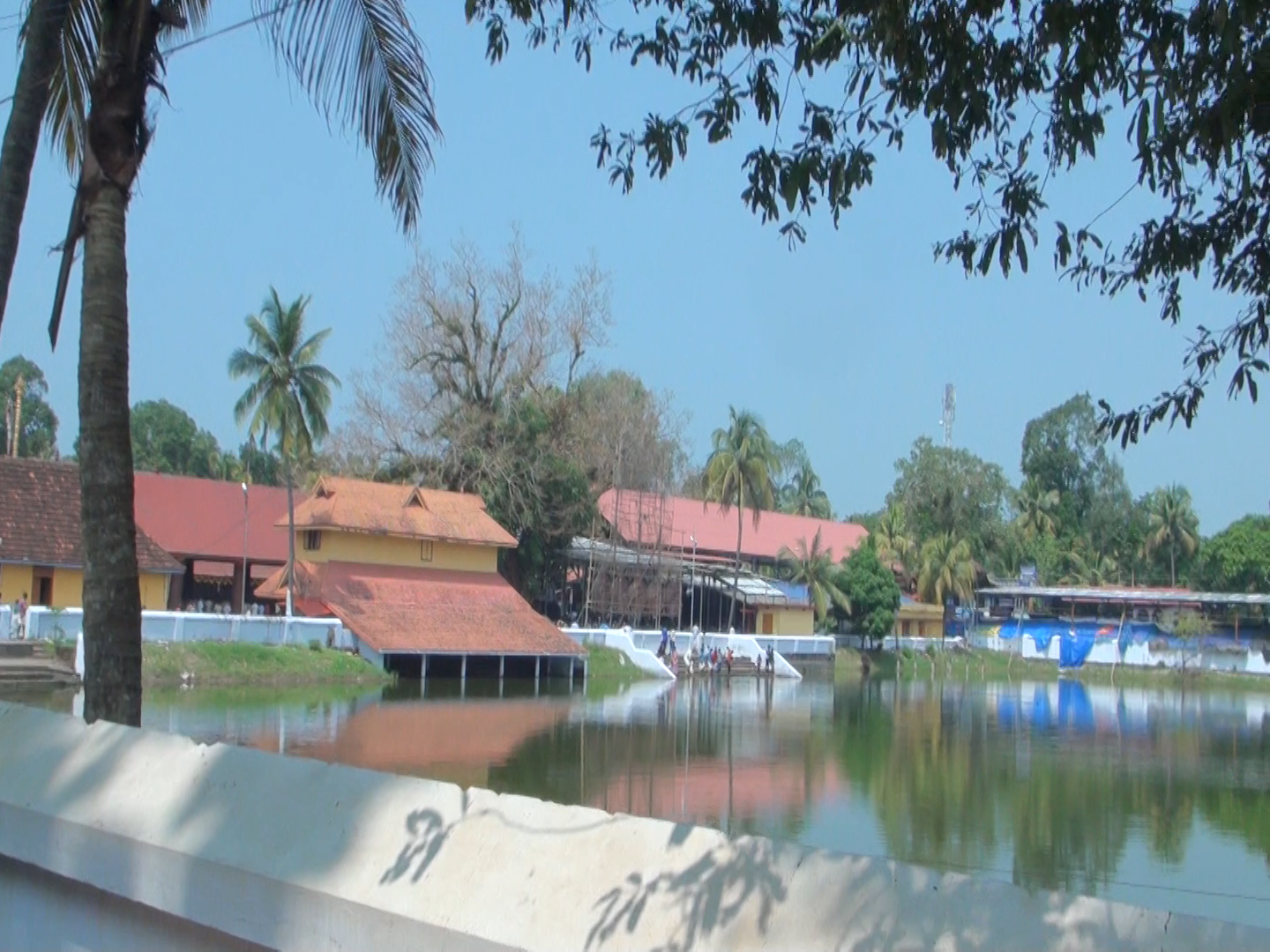 Thuravoor temple Cherthala fresh water pond